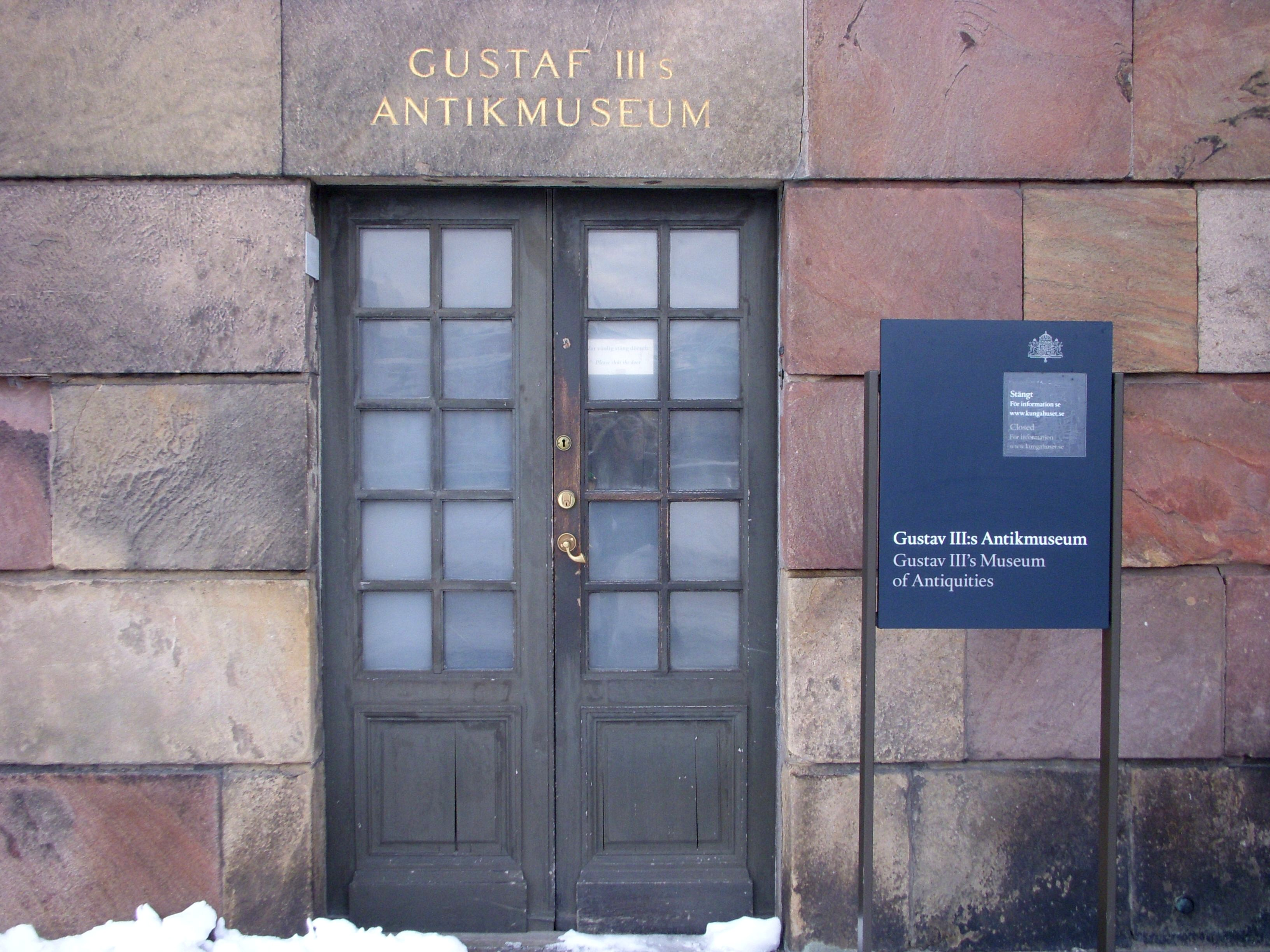 Entré till Gustaf III:s antikmuseum i Stockholms slott